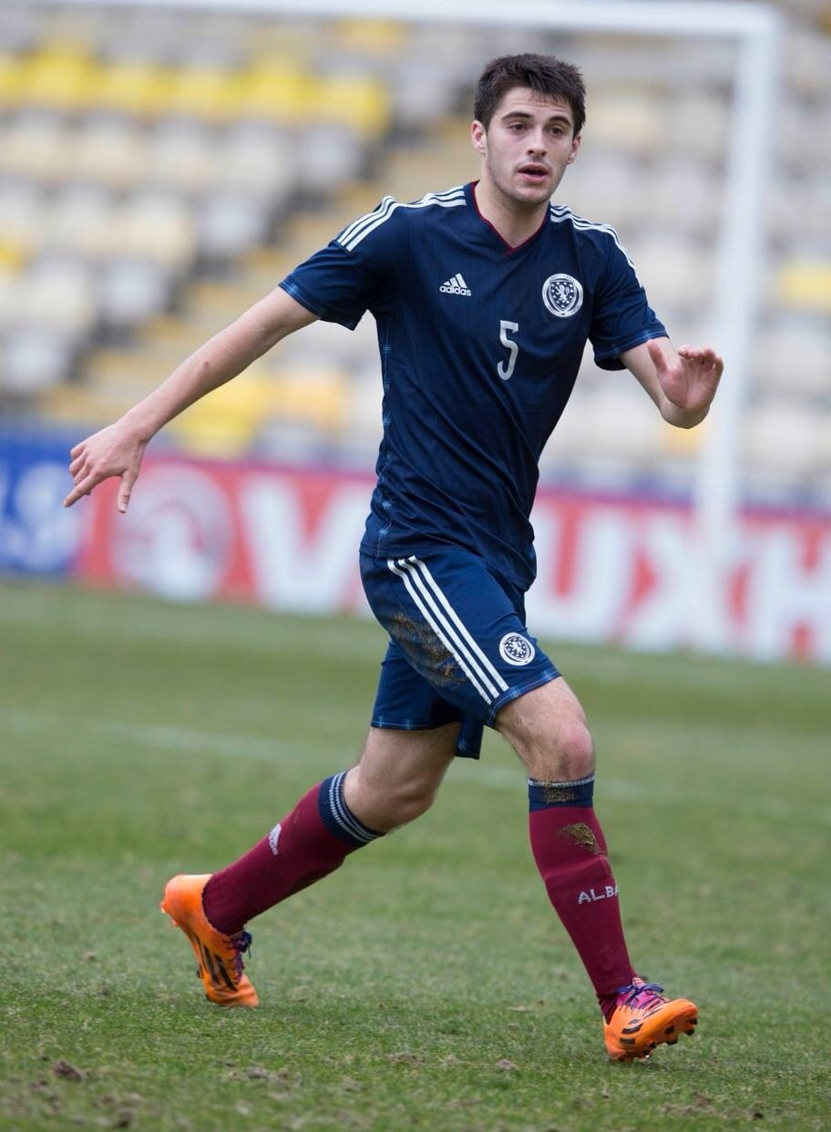 Stephen Hendrie on his Scotland under 19's debut